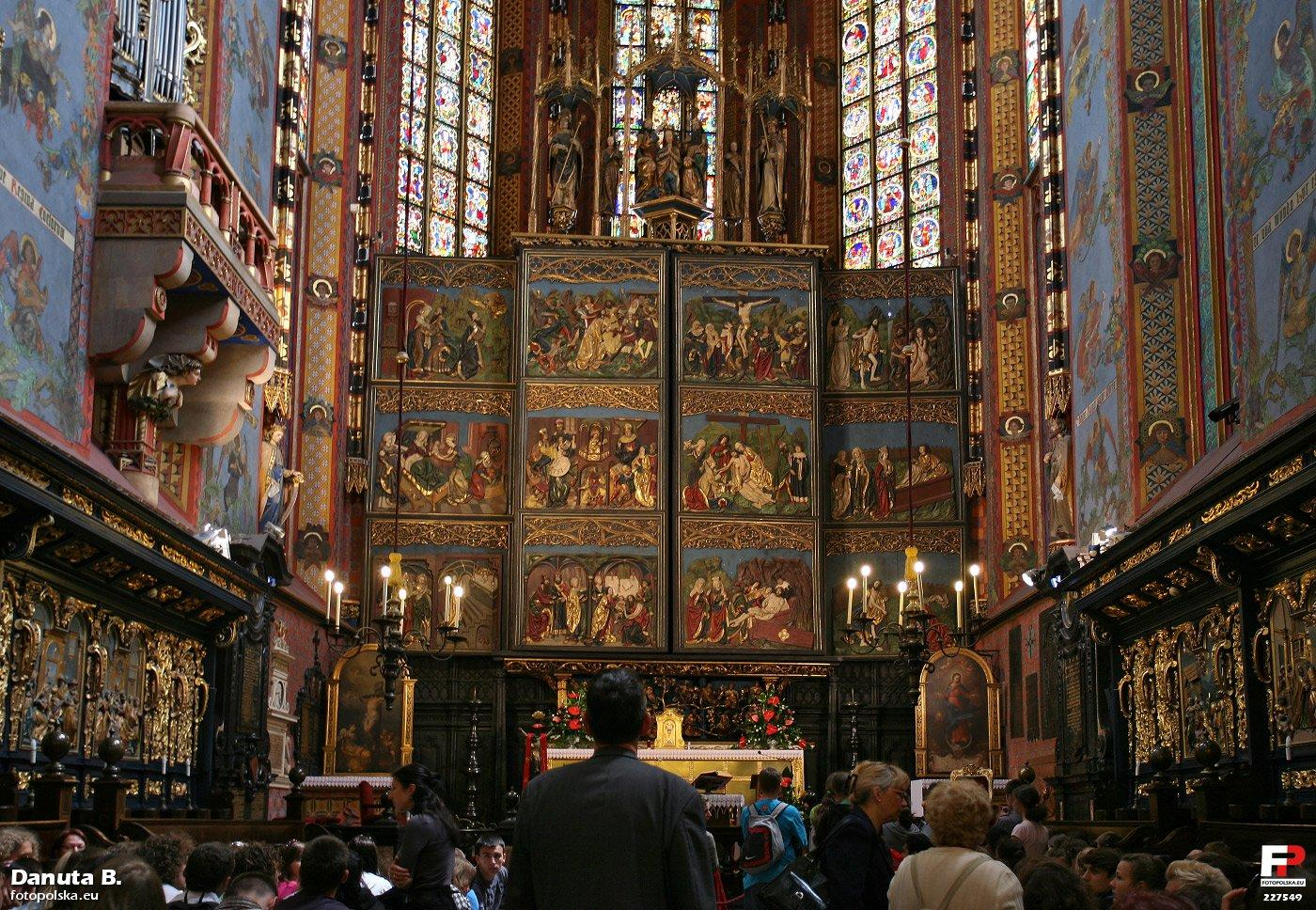 Ołtarz Wit Stwosza tuż przed otwarciem.